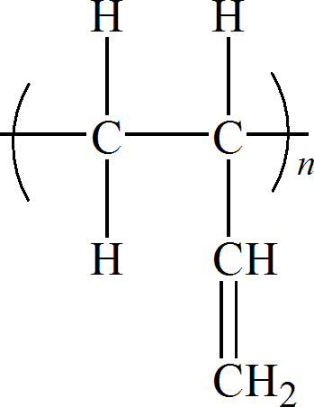 el vinilo